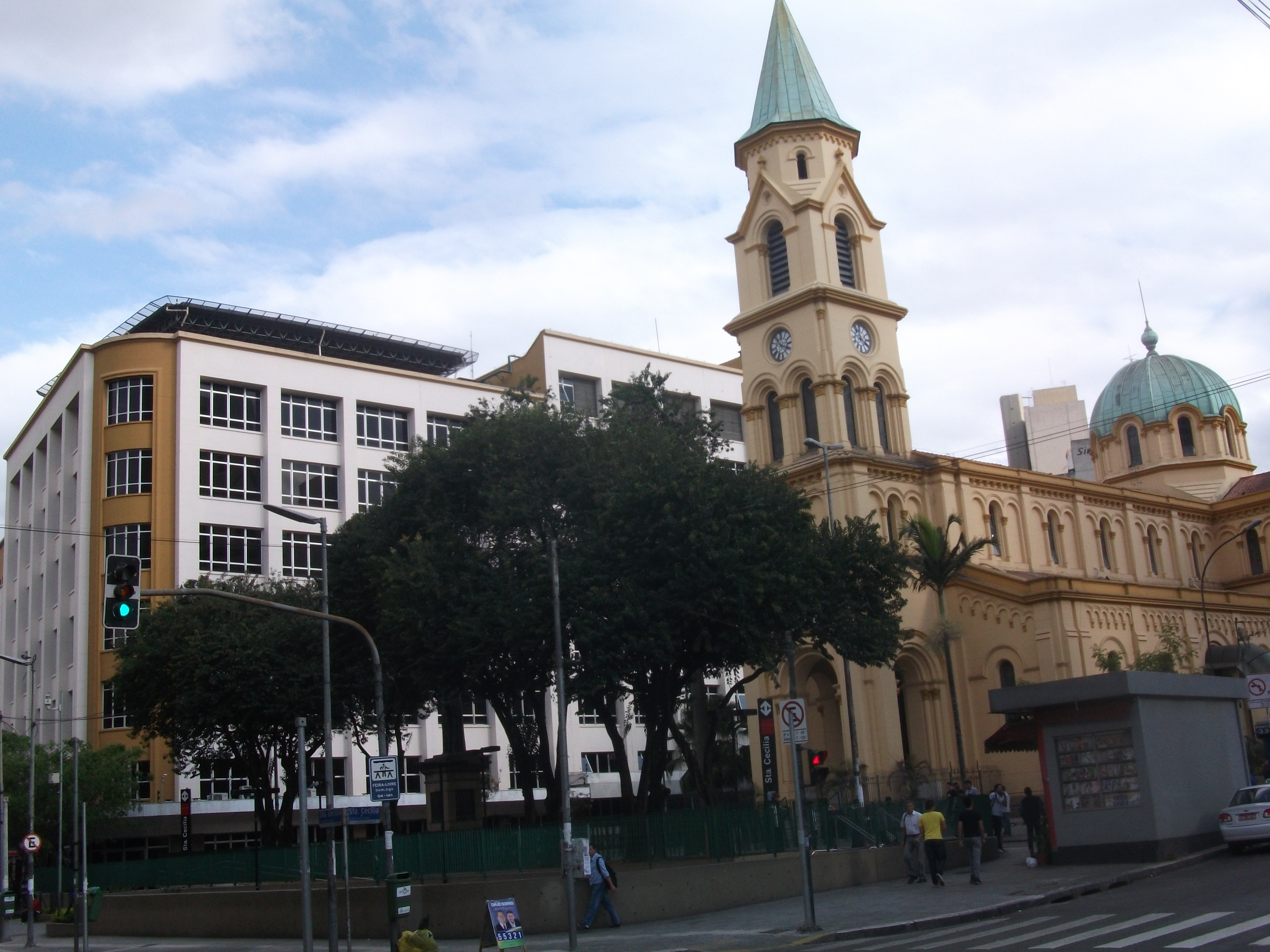 Vista do Largo Santa Cecília no bairro de mesmo nome na cidade de São Paulo